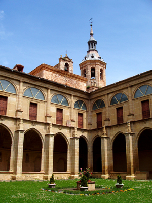 Claustro del Monasterio de San Millán. Yuso